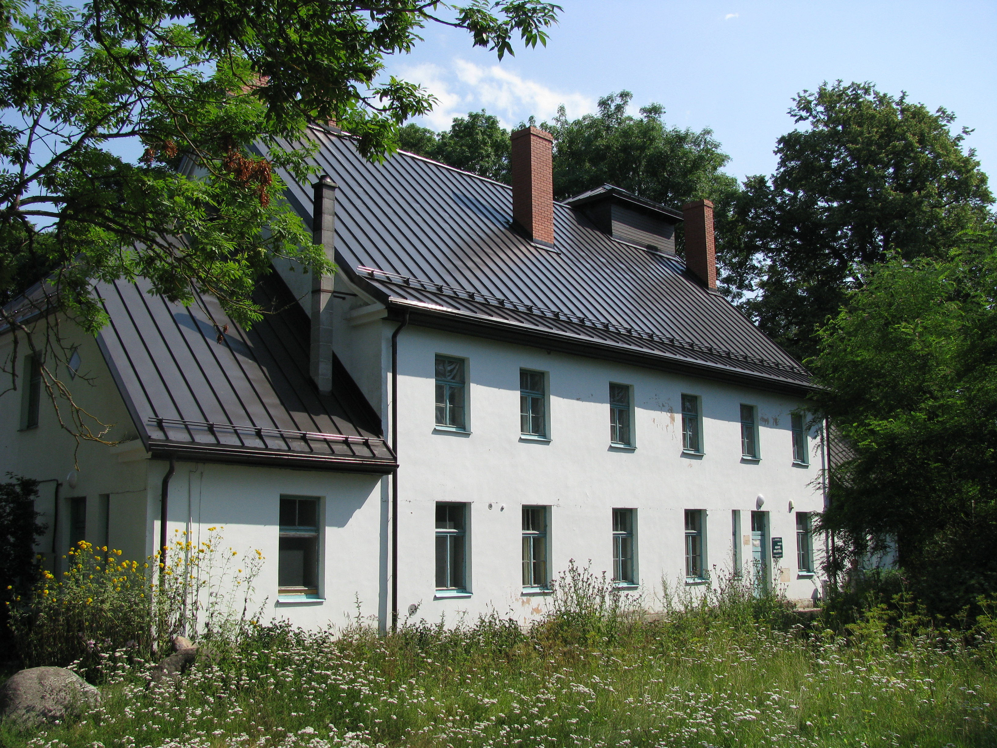 Valgales muiža un bibliotēka. Library at Valgale manor building. August, 2014